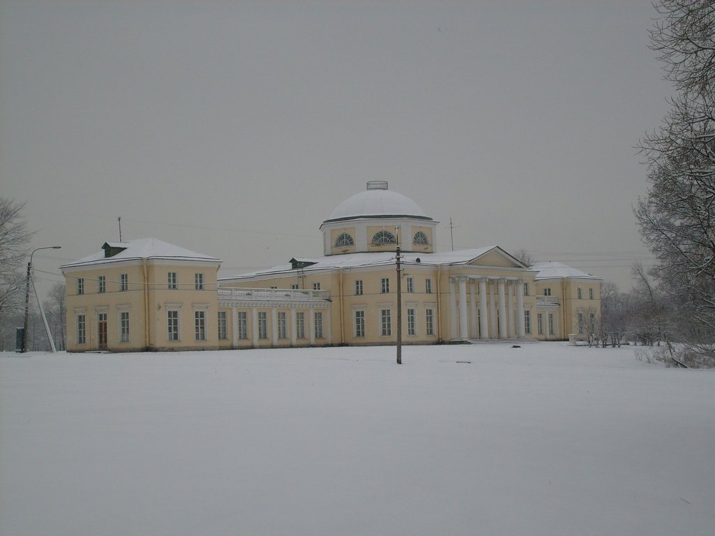 Усадьба Александрино. Санкт-Петербург, пр. Стачек, 226